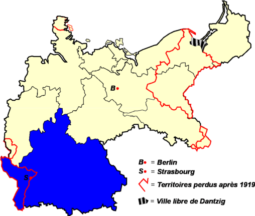 Territoires couverts par la Fédération de football d'Allemagne du Sud (VSFV) de 1905 à 1933 Catégorie:Logo Fédérations Allemandes de Football